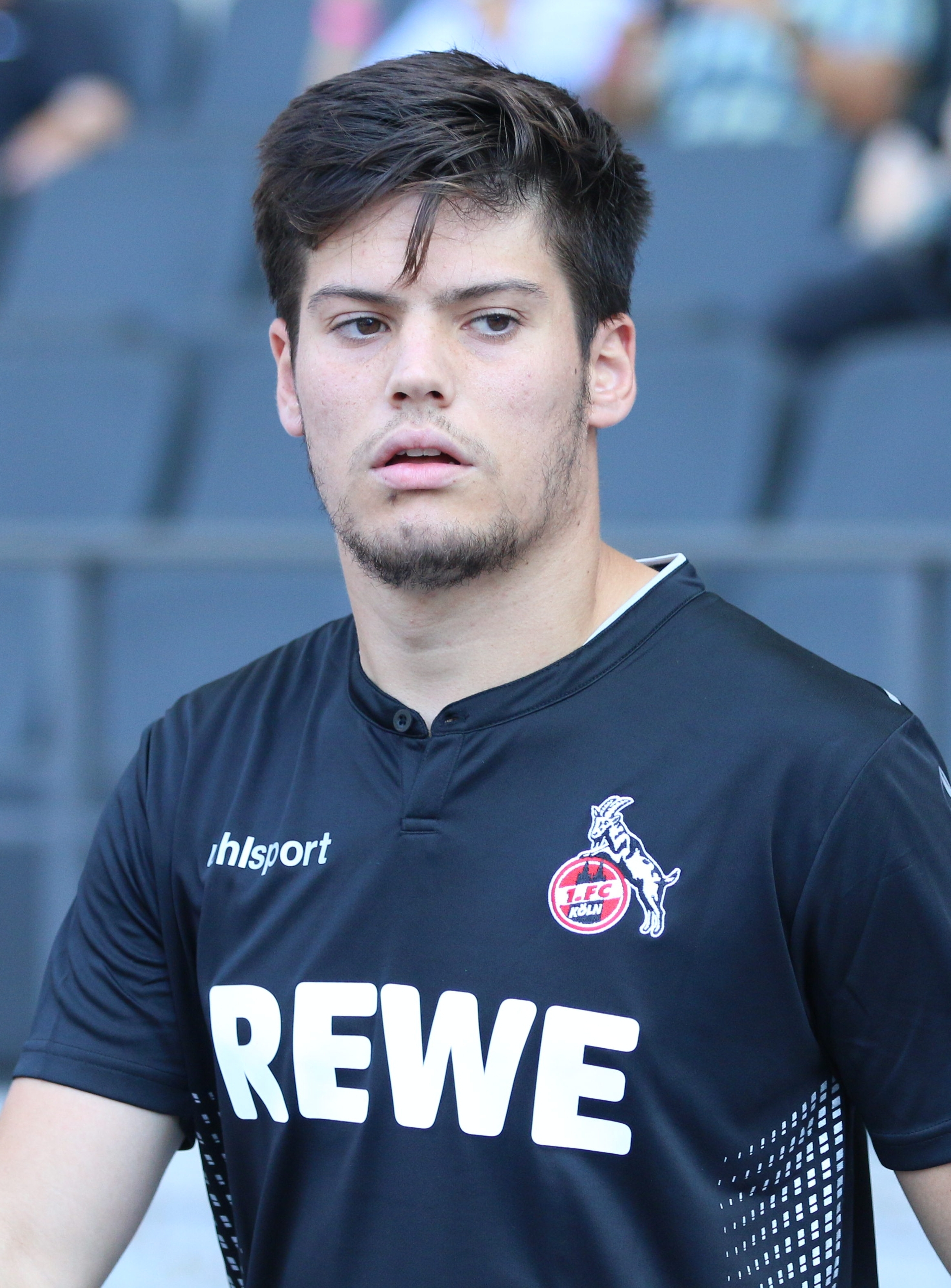 DFB-Pokal 2018/19, 1. Hauptrunde: BFC Dynamo gegen 1. FC Köln 1:9 (1:4): Jorge Meré